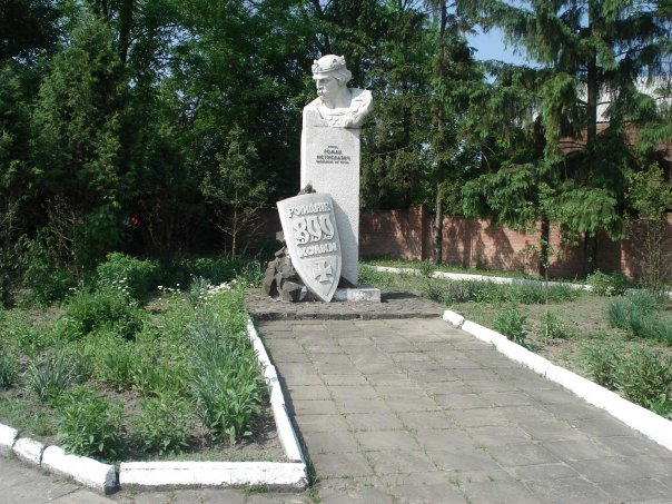 Пам'ятник князю Роману Мстиславовичу, засновнику містечка.